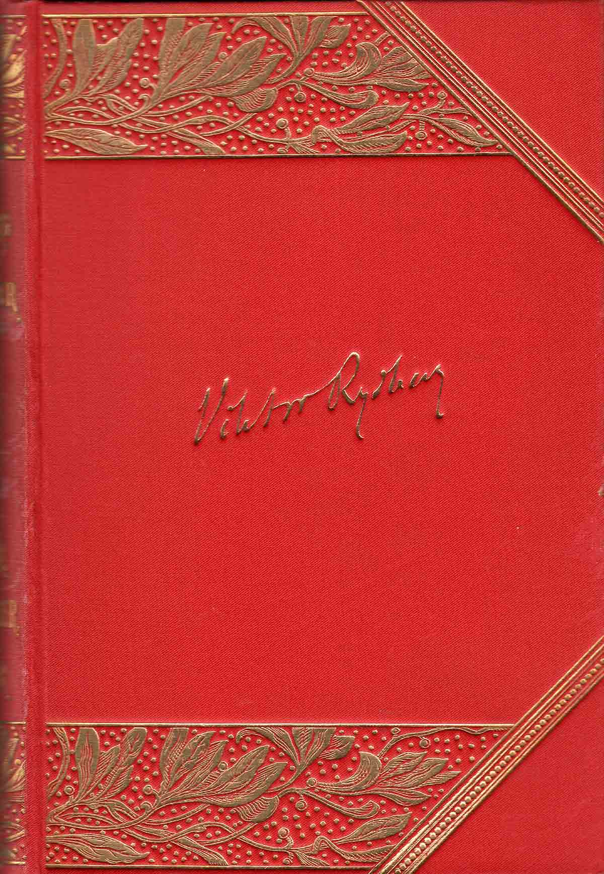 Viktor Rydbergs skrifter. Book cover